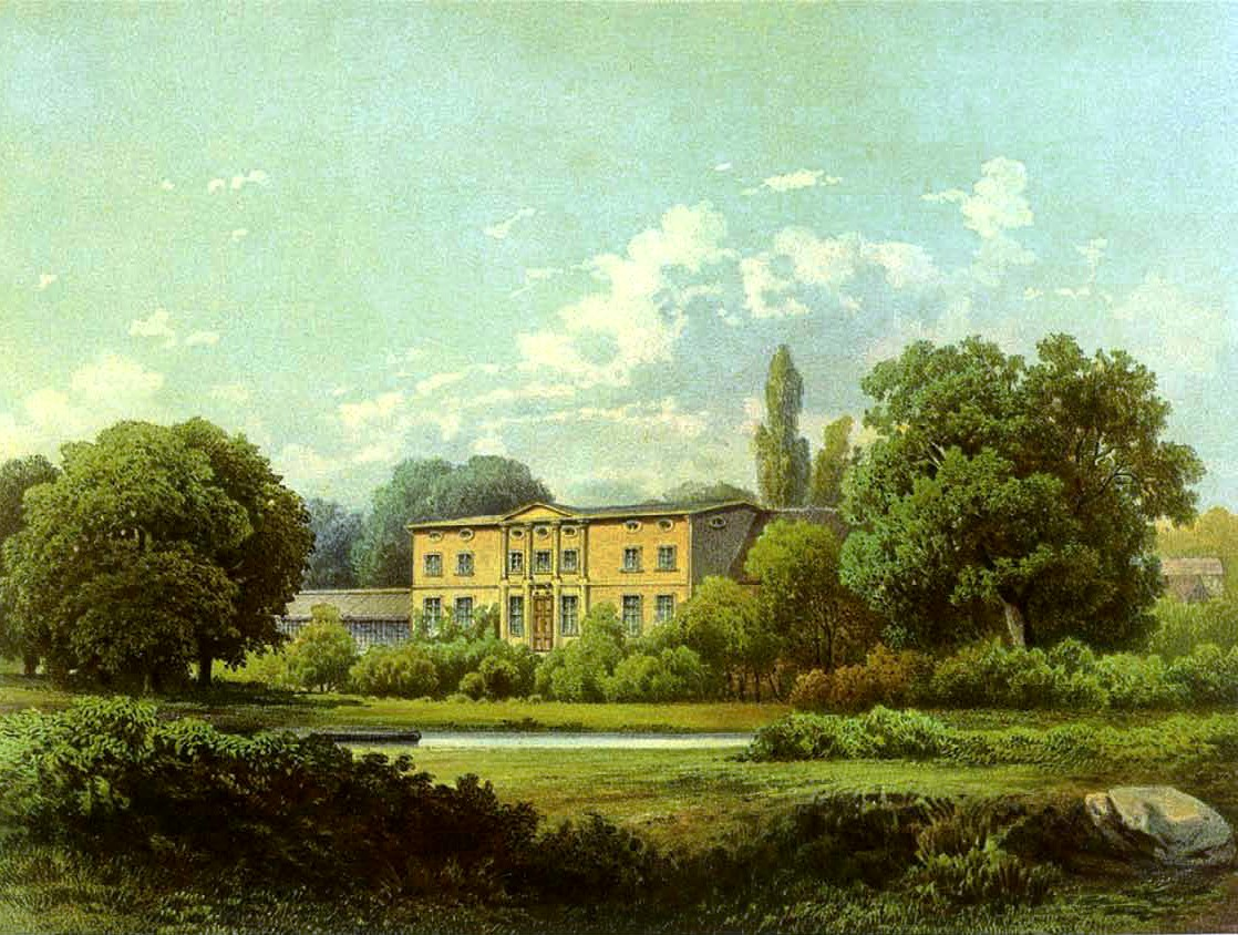 Rittergut Starnitz, Kreis Stolp, Provinz Pommern